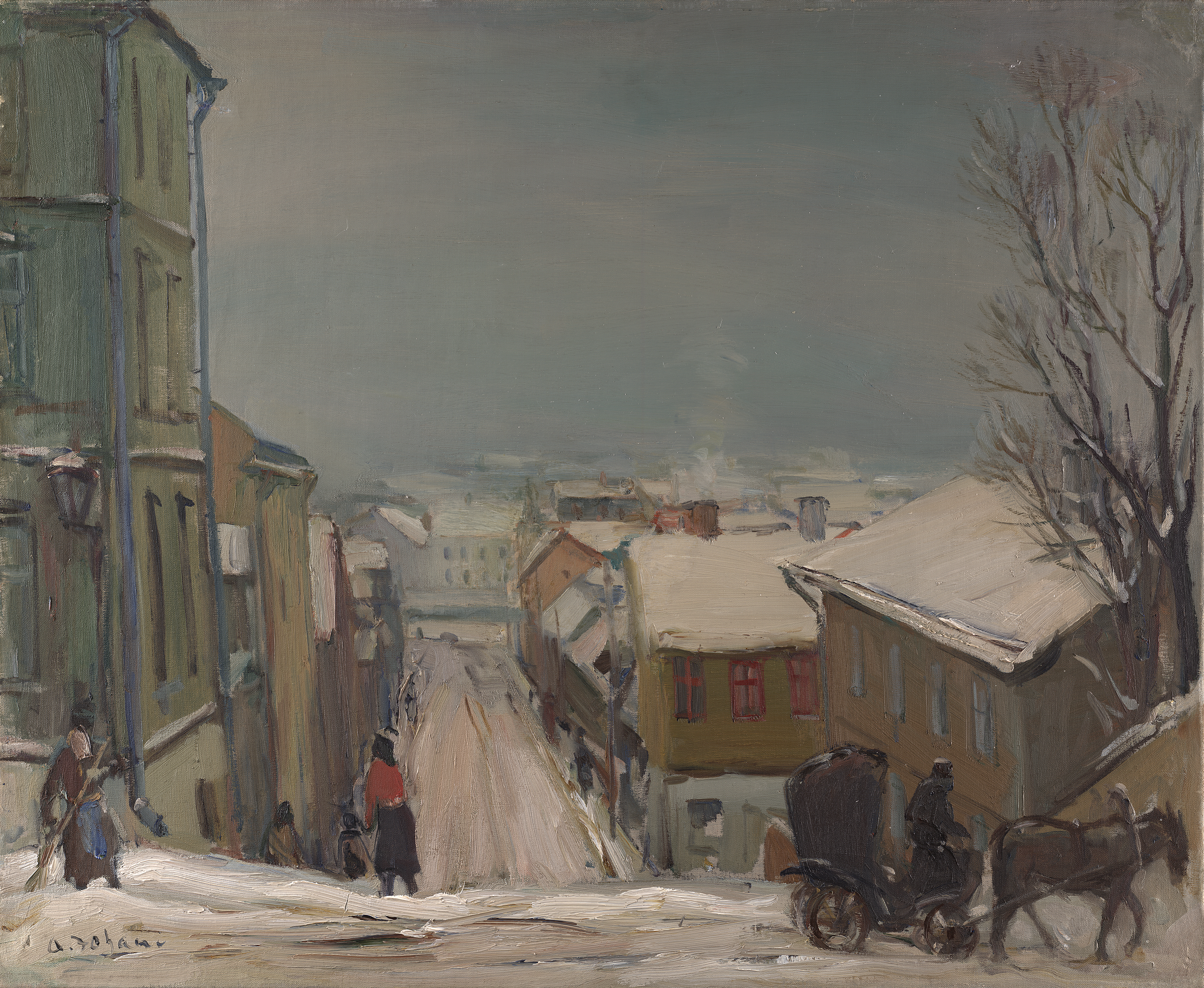 "Talvemaastik Tartus (Liiva tänav talvel)" (1940). Õli lõuendil. 59,7 x 72,7 cm. This image on crowdsourcing geotagging platform Ajapaik MUIS: TKM TR 4898 M 800